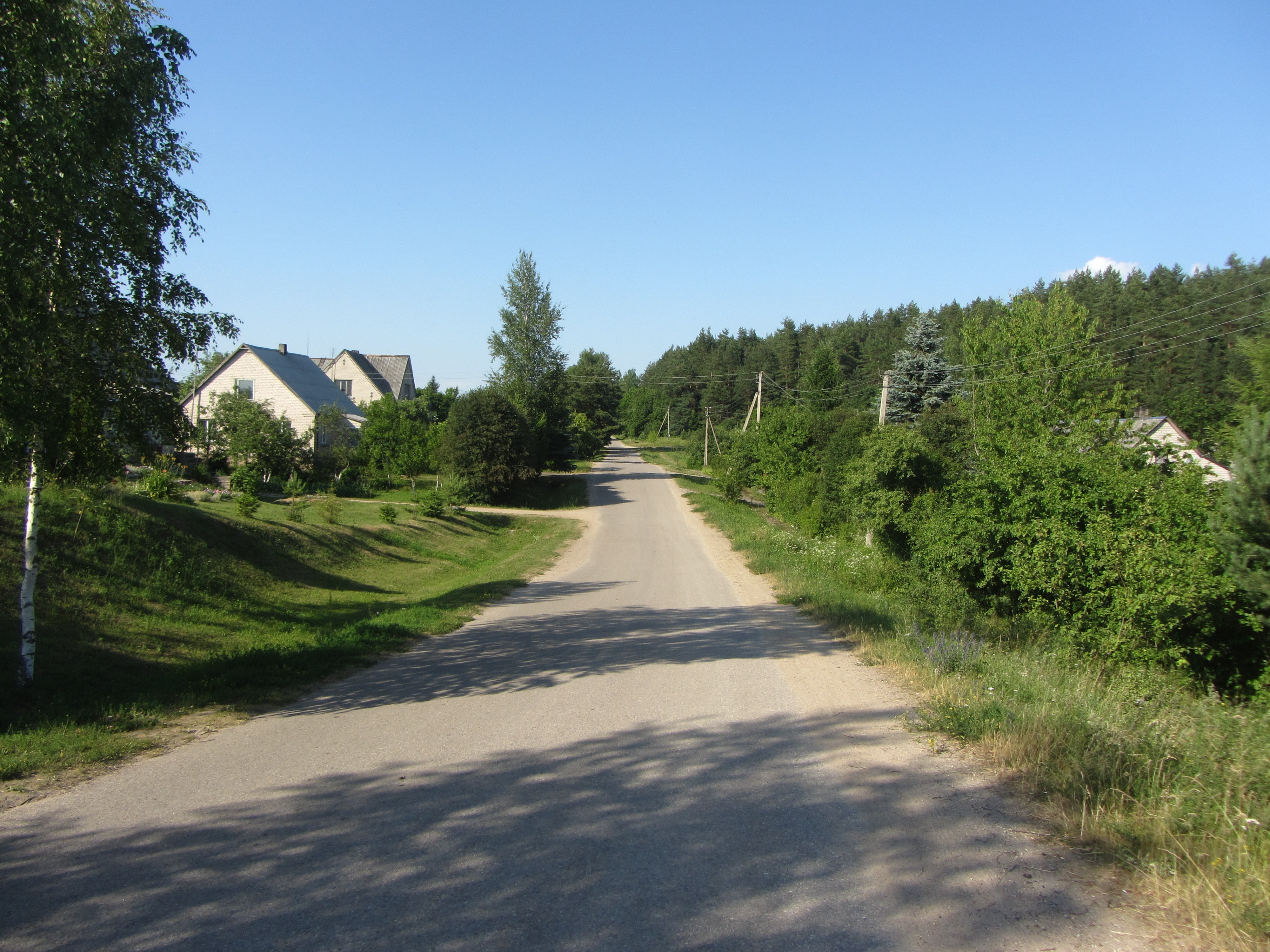 Katlėriai, Lithuania